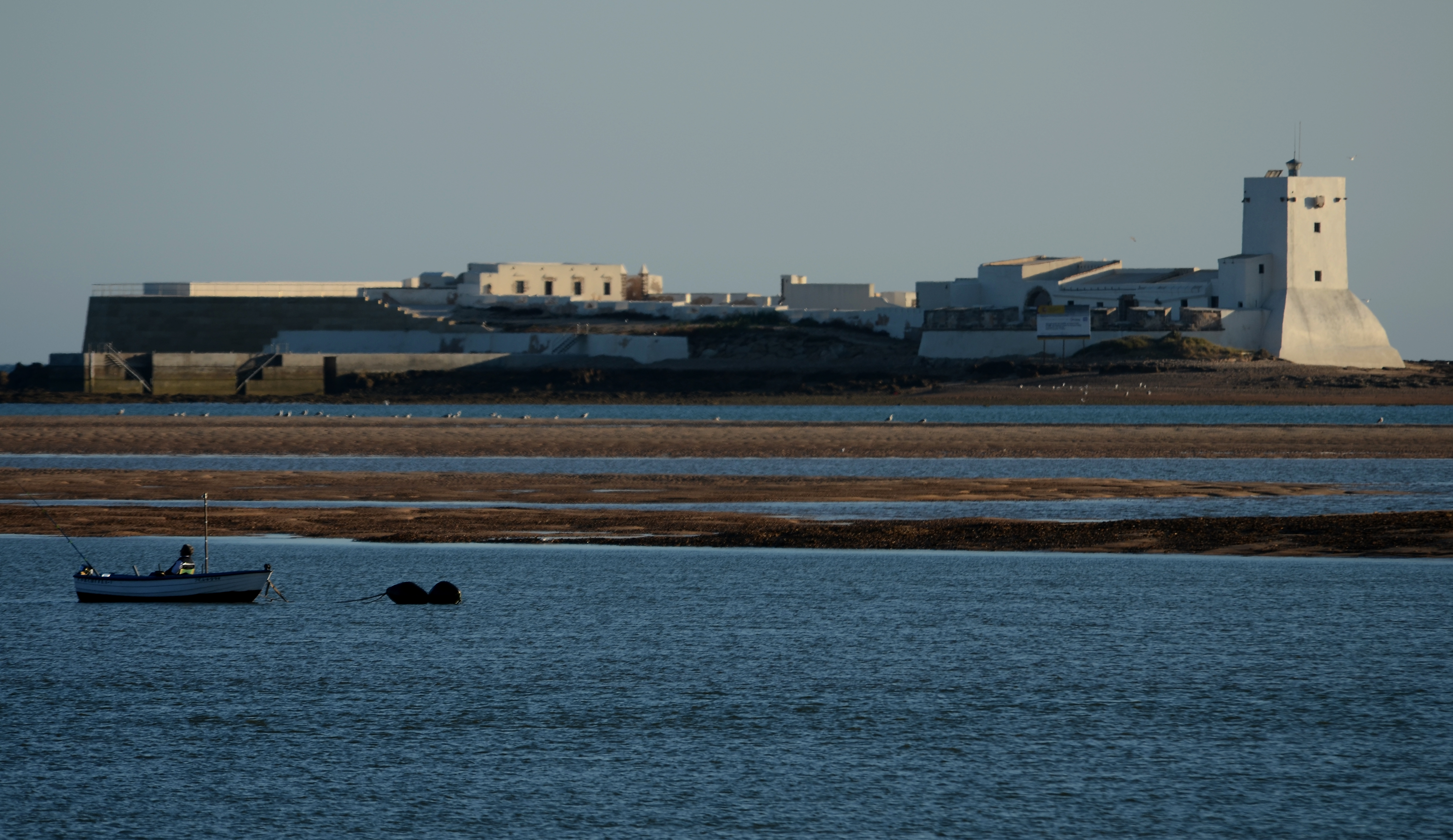 Fortaleza. Que contrasta con la -aparente- fragilidad de la barquita. Es interesante la historia del Castillo e Islote de Sancti Petri.